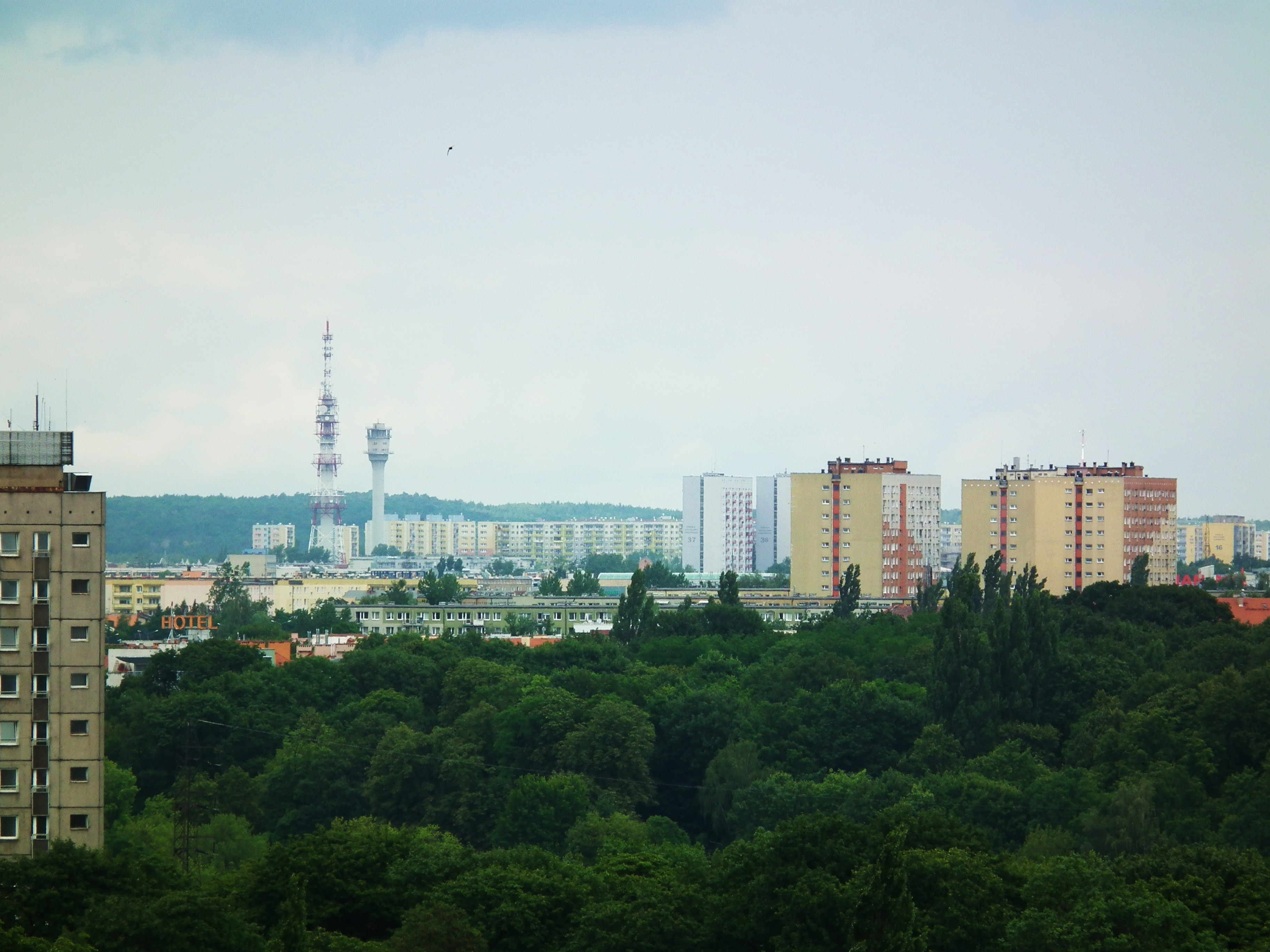 Widok z wieży Zamku Królewskiego w Poznaniu.